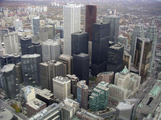 Gratte-ciel pris depuis la tour du CN, à Toronto (Canada). Licence : Artlibre. Auteur : Utilisateur:Haypo.